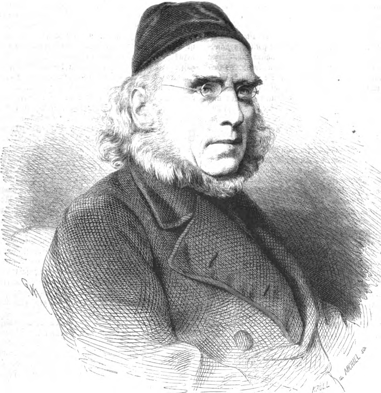 Emil Cauer, der Ältere, deutscher Bildhauer im 19. Jh.